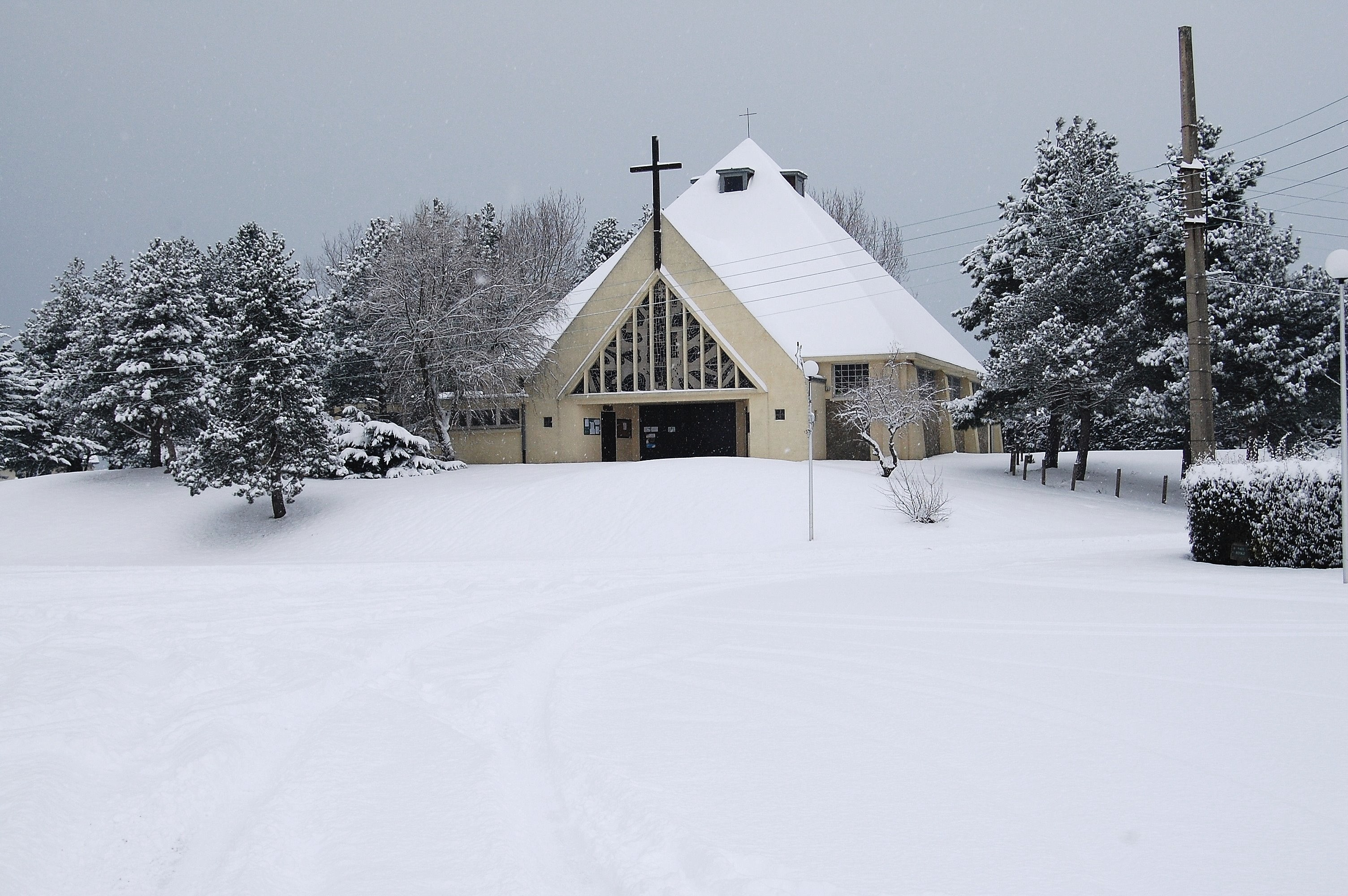 Cucq (Pas-de-Calais, France). L'église Sainte-Thérèse-de-l'Enfant-Jésus de Stella-Plage, sous la neige. .